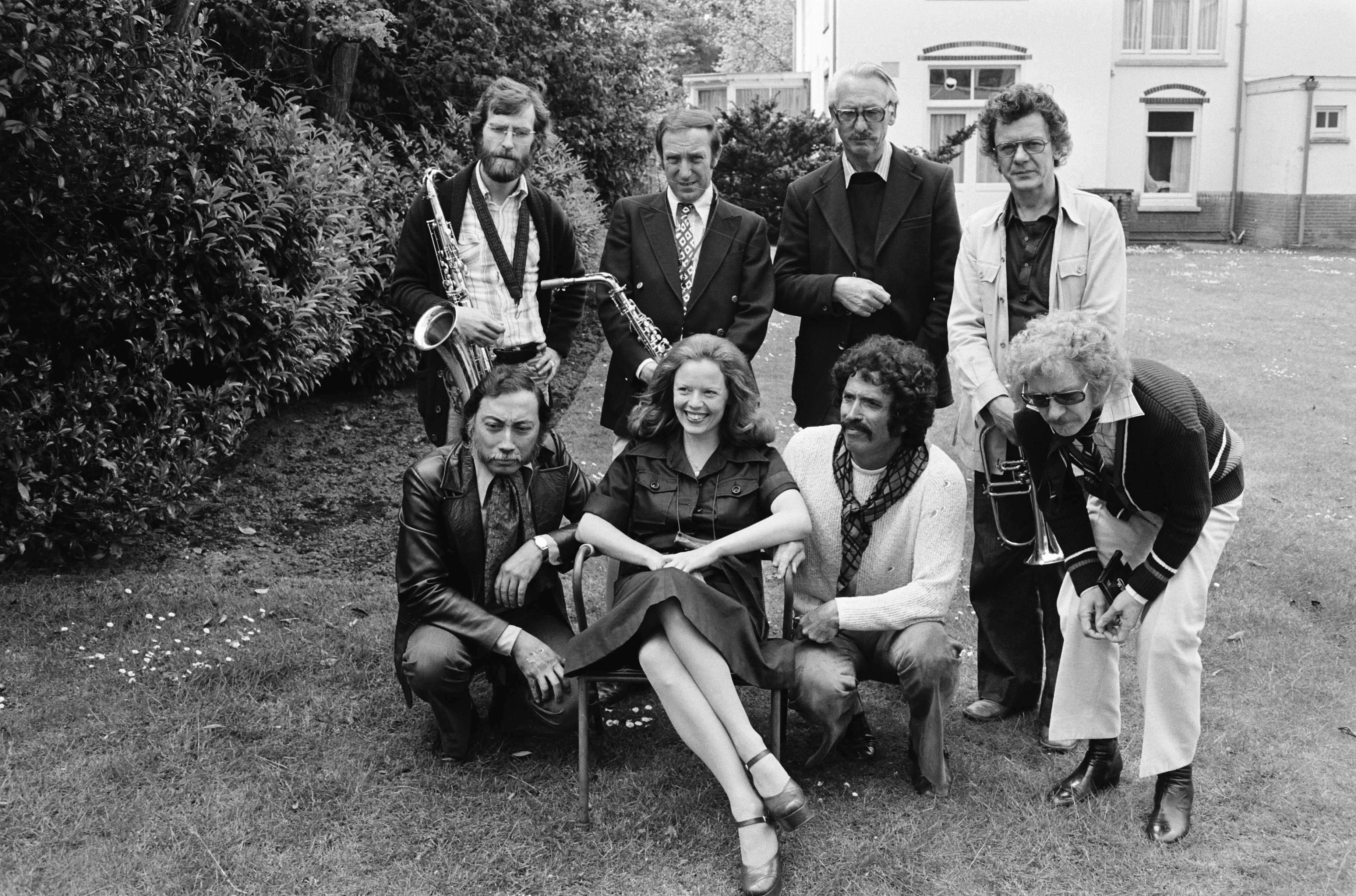 Afvaardiging naar het internationale Nordring Festival in Oslo Hele gezelschap, achterste rij vlnr Ferdinand Povel, Piet Noordijk, Dolf van der Linden en Ack van Rooyen, voorste rij vlnr Rob Pronk, Greetje Kauffeld, Mark Murphy, Jerry van Rooyen Datum 5 juni 1975